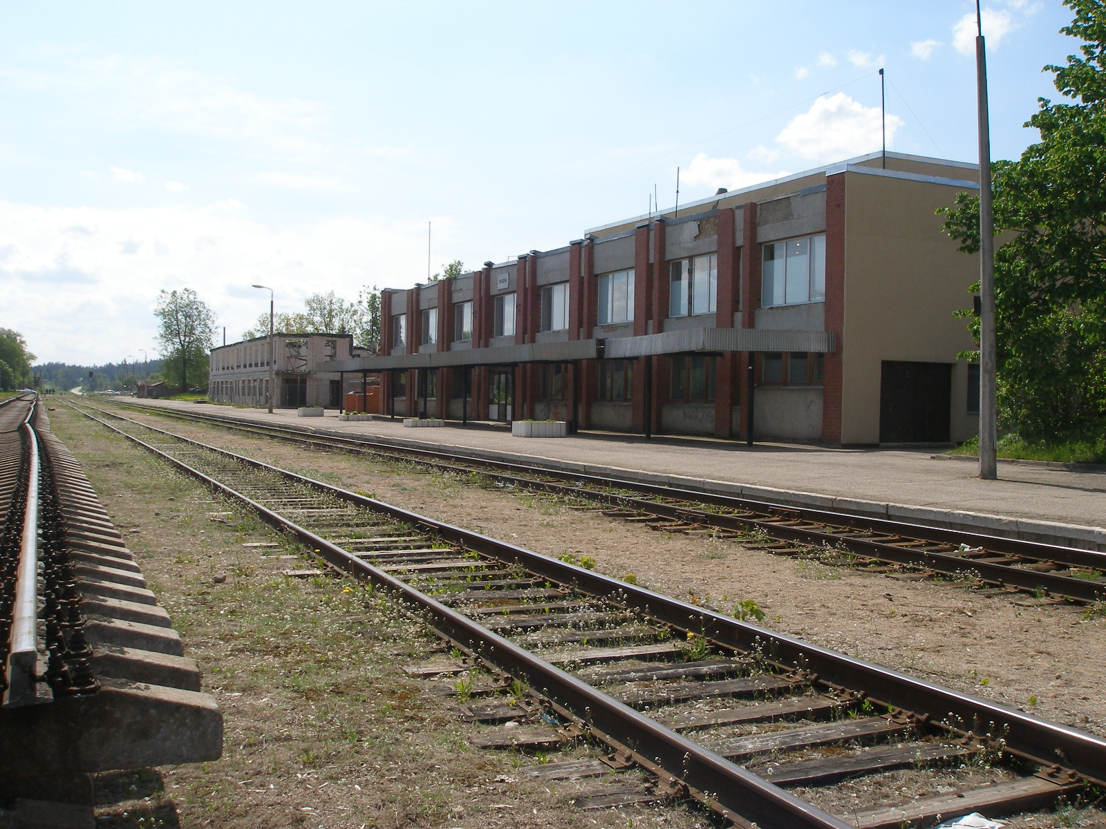 Madonas stacijas ēka un sliežu ceļi.